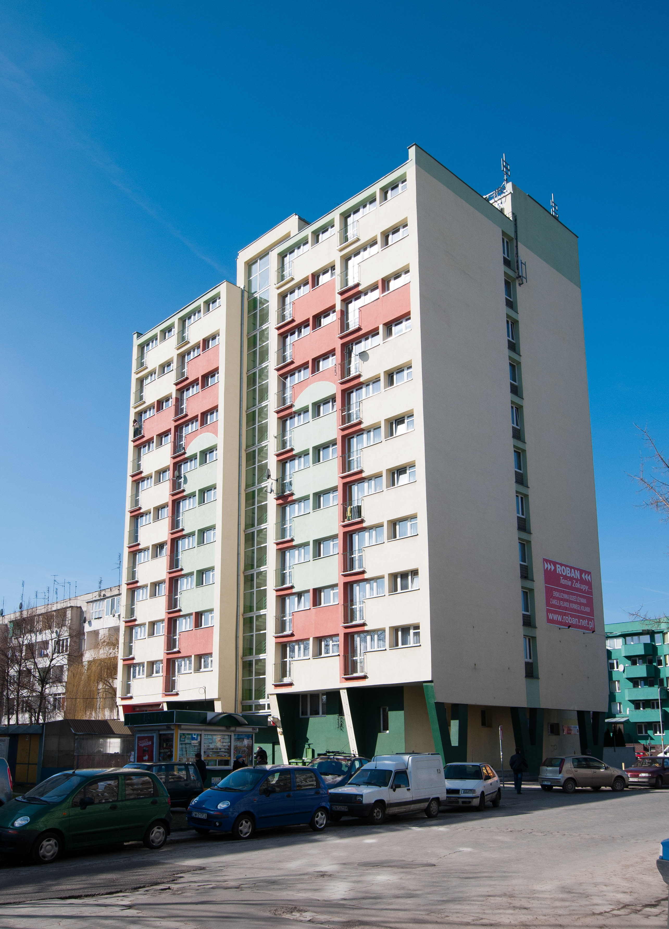 Wrocław, ul. Żelazna 46. Internat Garnizonowy.